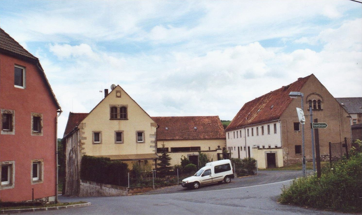 Liebstadt, OT Biensdorf: Dreiseitenhof